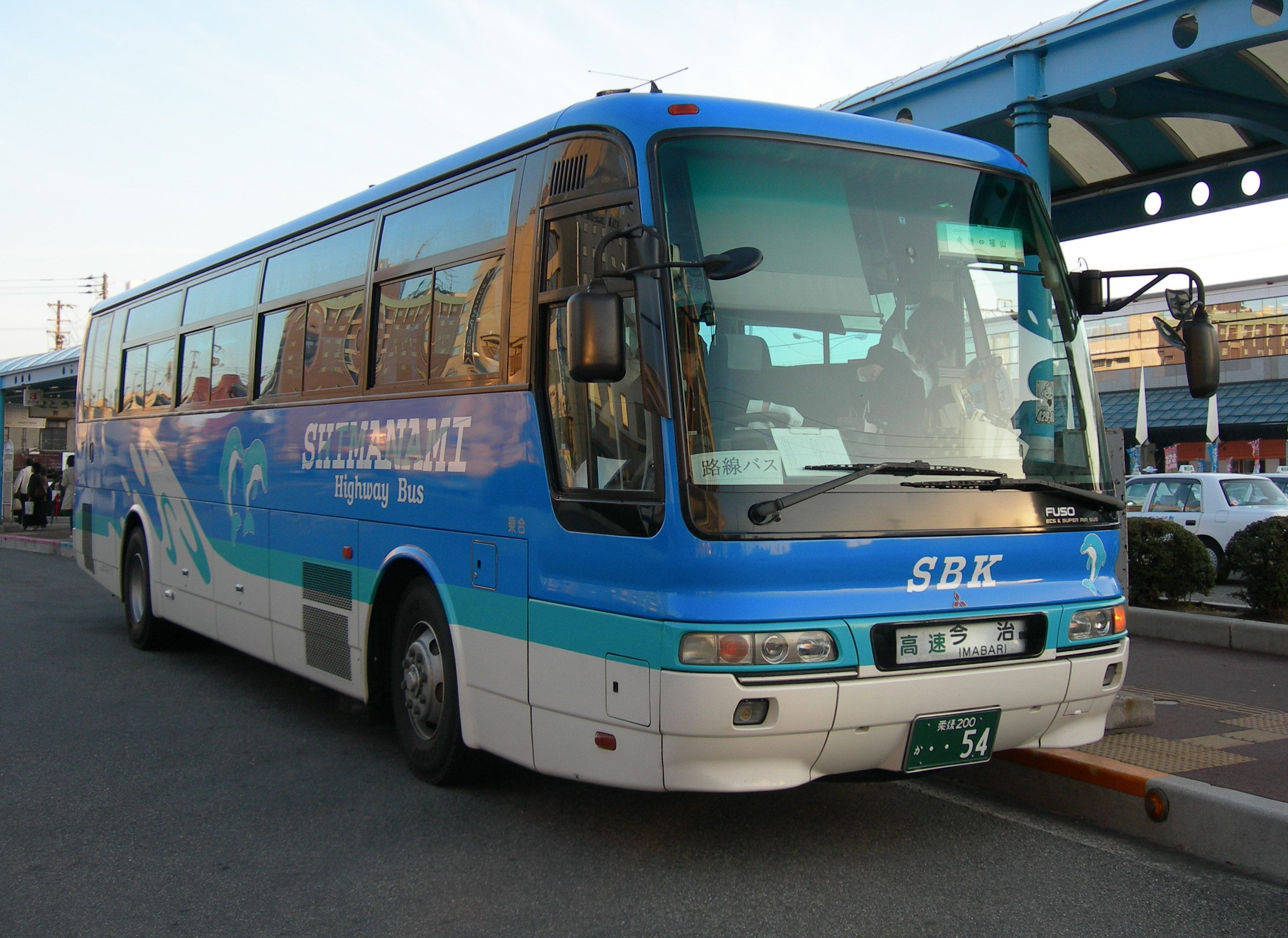 しまなみバス開発 しまなみライナー (福山 - 今治線)